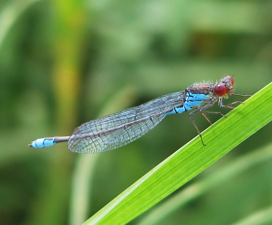 Beschreibung: Kleines Granatauge / Männchen / male (Erythromma viridulum) Fotograf: Darkone, 16. August 2005